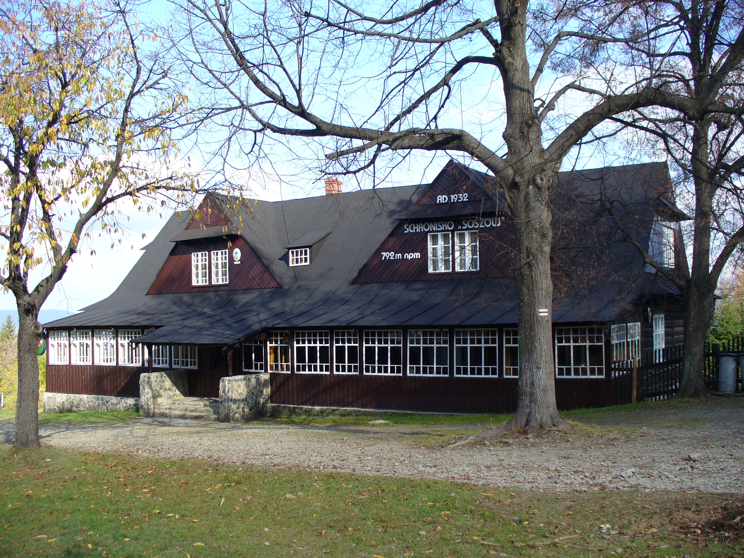 Schronisko na Soszowie (Beskid Śląski)